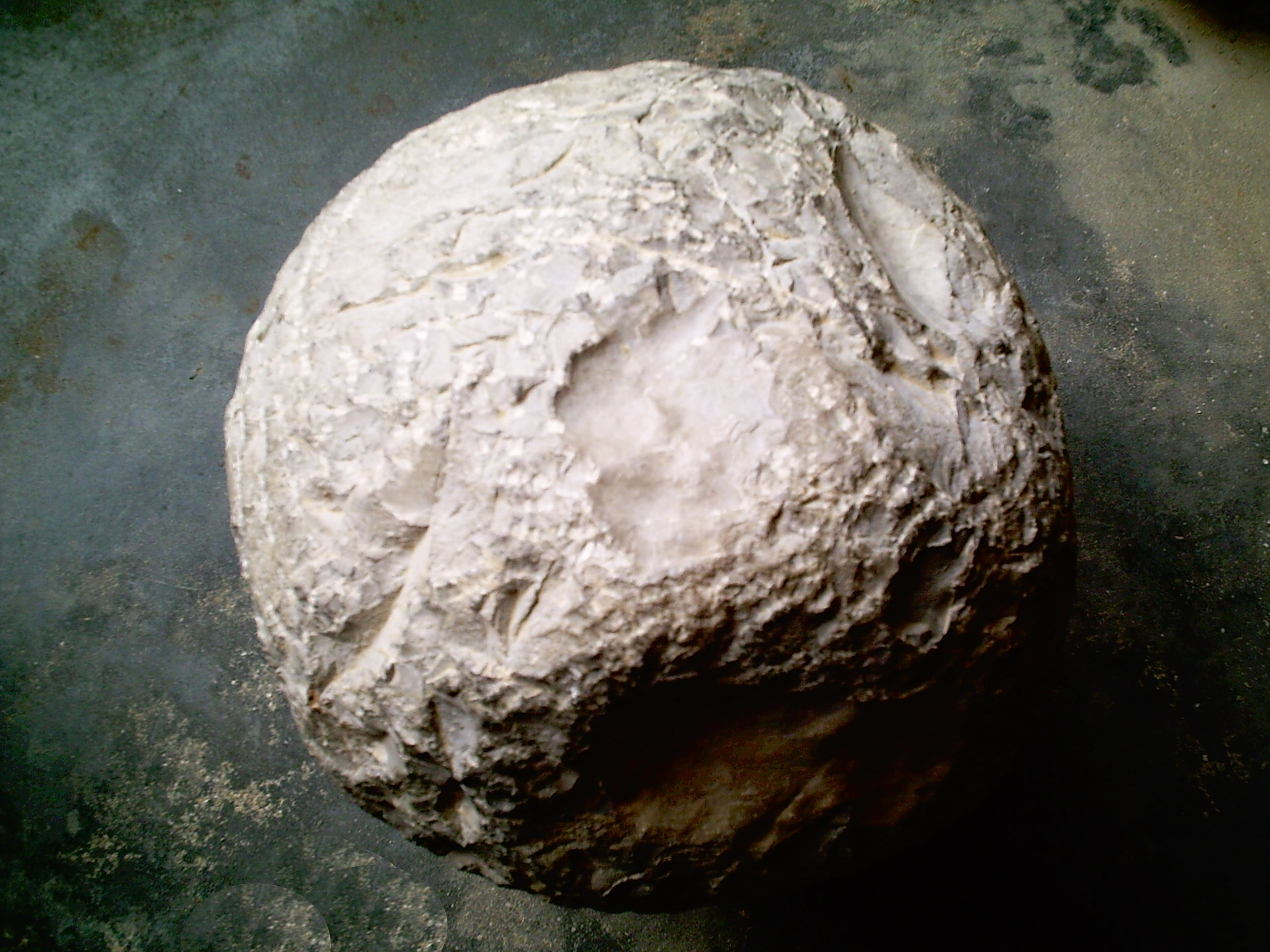 Un boulet... photo personnelle